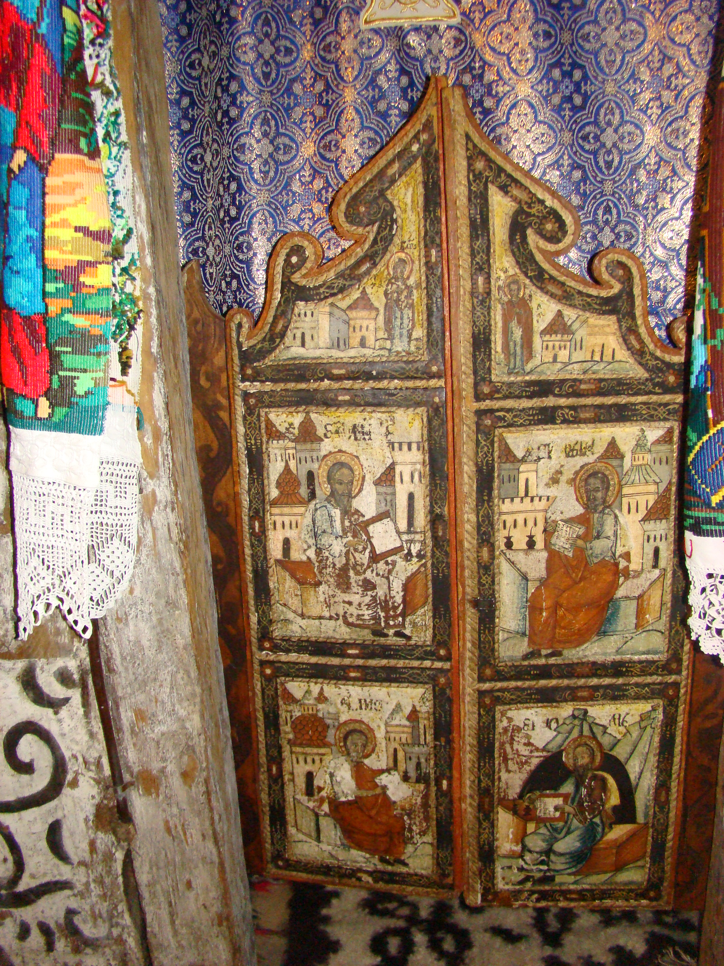 Biserica de lemn din Budești-Josani, județul Maramureș